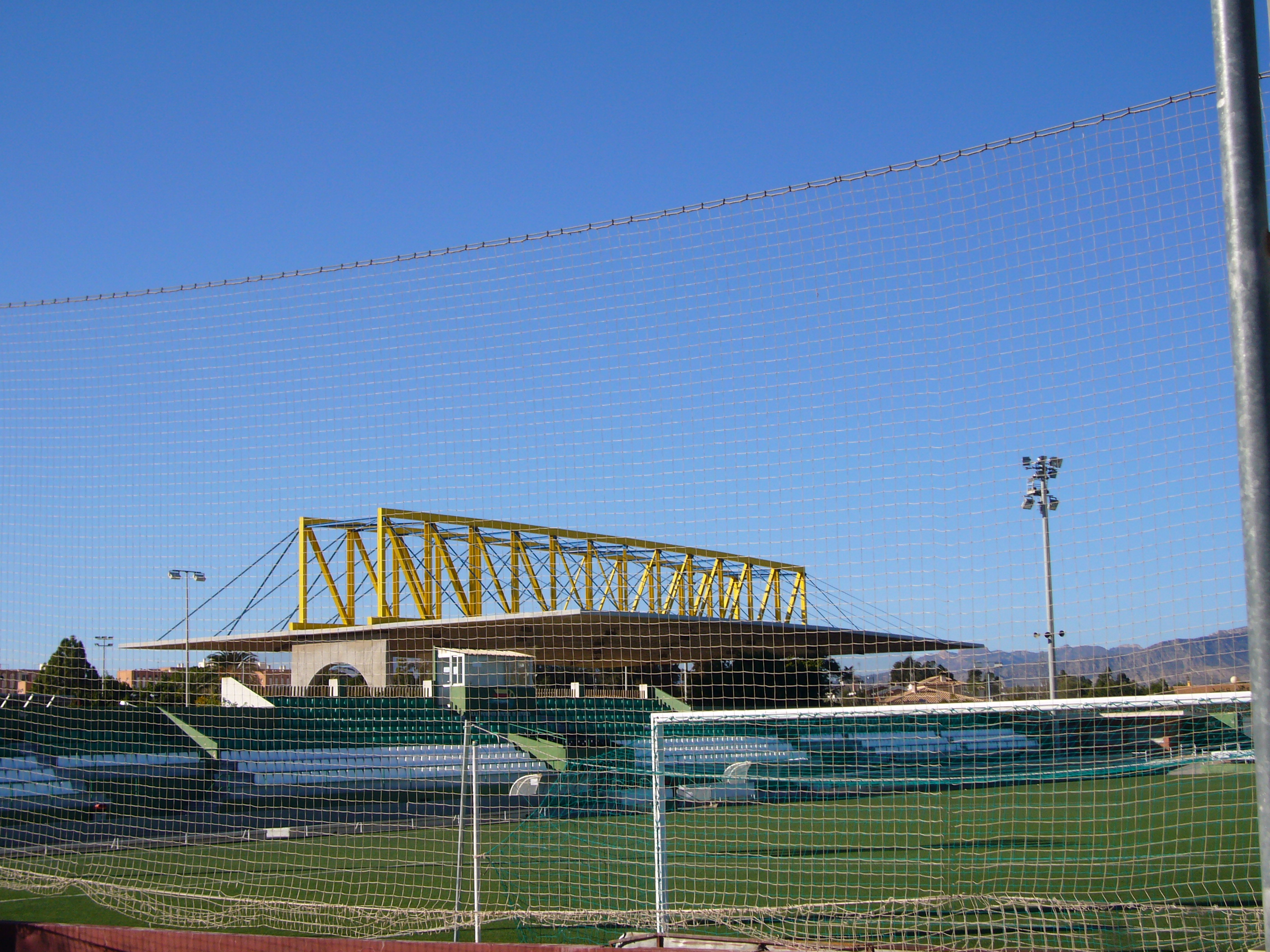 Vista de la grada lateral del campo de fútbol de la Ciudad Deportiva de San Vicente del Raspeig (Alicante).